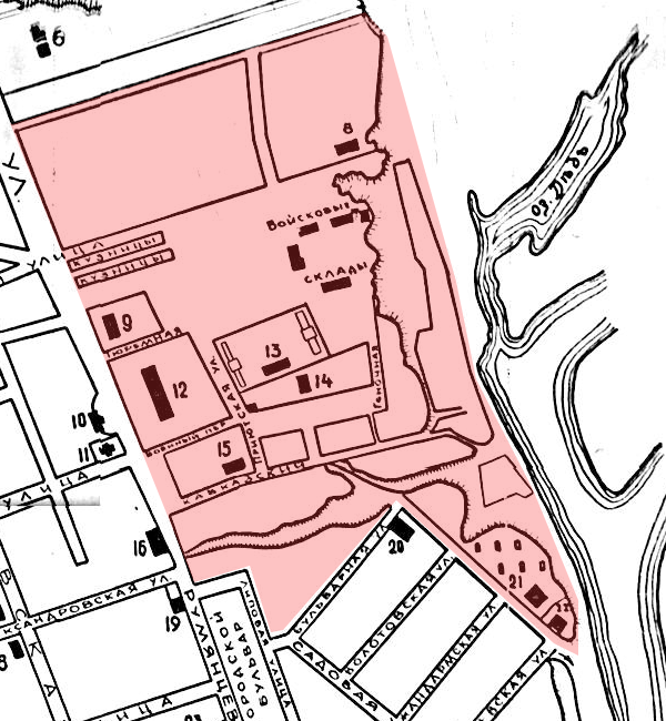 Тэрыторыя гомельскага "Каўказа" (выкарыстаны план 1910 г.).